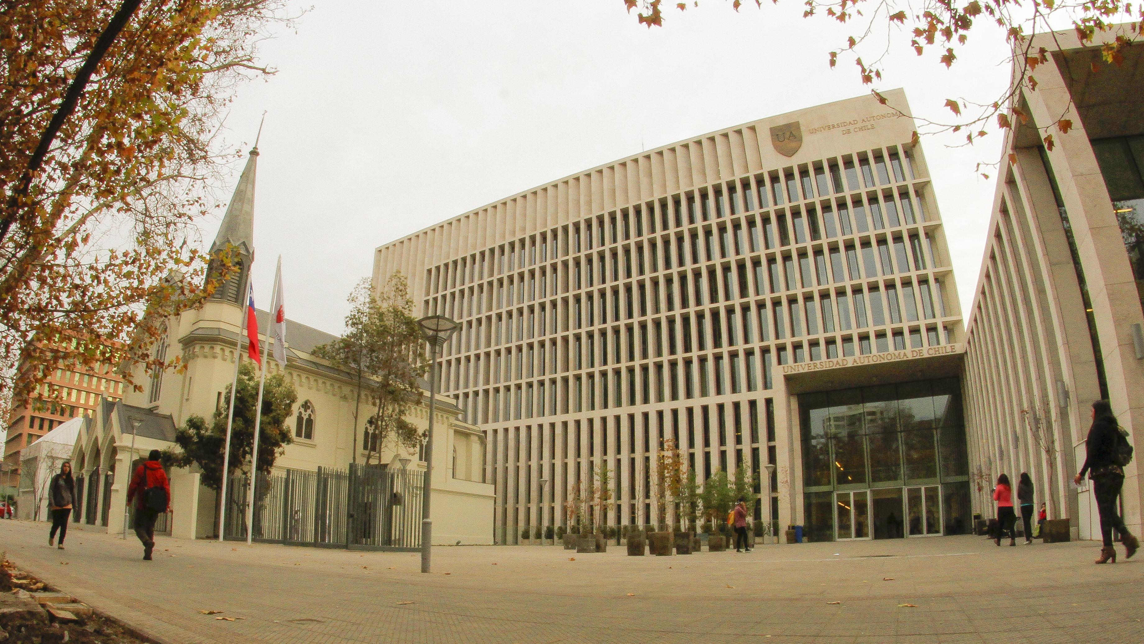 Frontis Campus Providencia, Universidad Autónoma de Chile